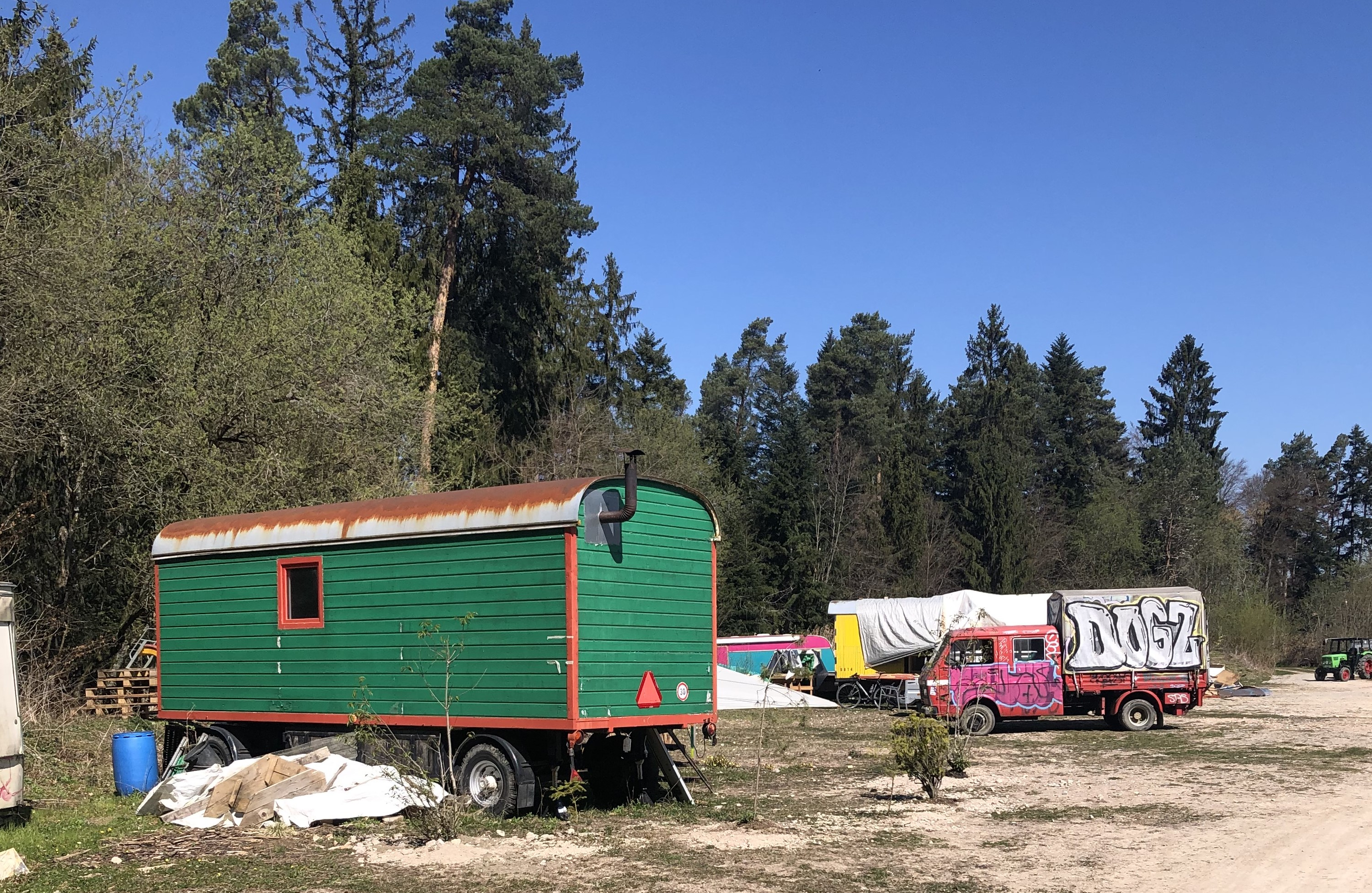 Eichholz Wagensiedlung